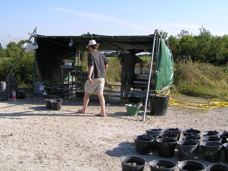 station de tamisage du site paléonthologique de Champblanc